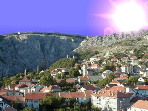 Grad Livno